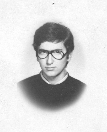 L'onorevole italiano Franco Grillini a 18 anni